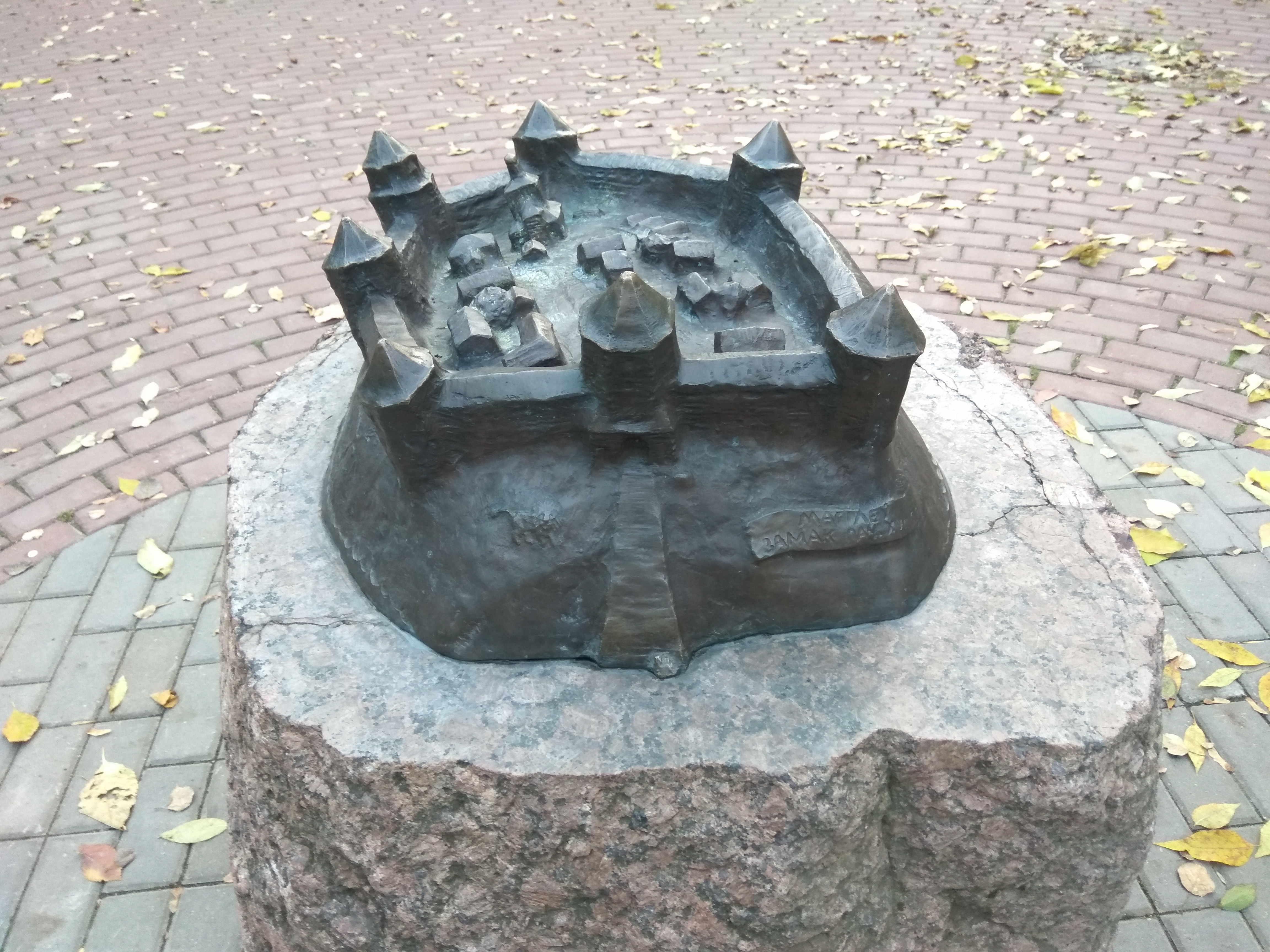 Магілёў. Парк культуры і адпачынку імя М. Горкага